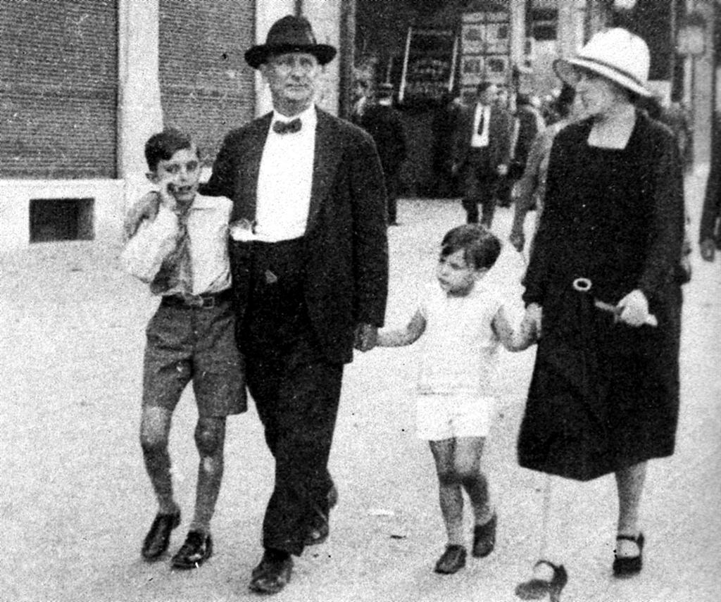 Manuel Ainaud Sanchez - amb la seva muller i els fills joan i josep maria 1932